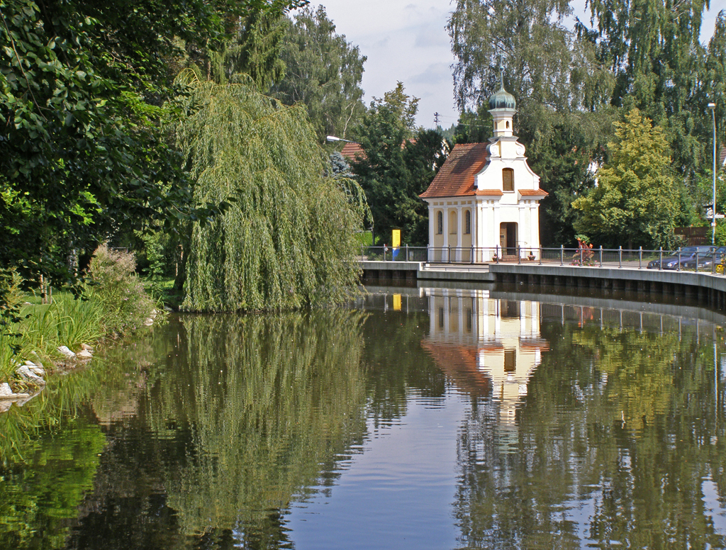 Fluss Kammel - in Krumbach (Schwaben) - Untere Mühle